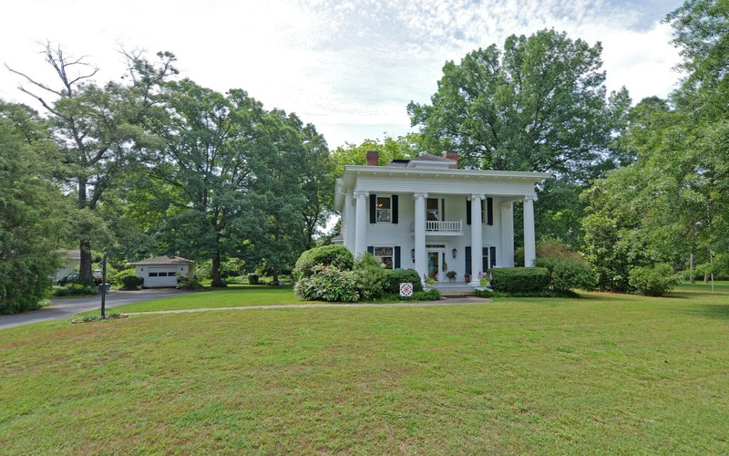 Pearl J. Jones House